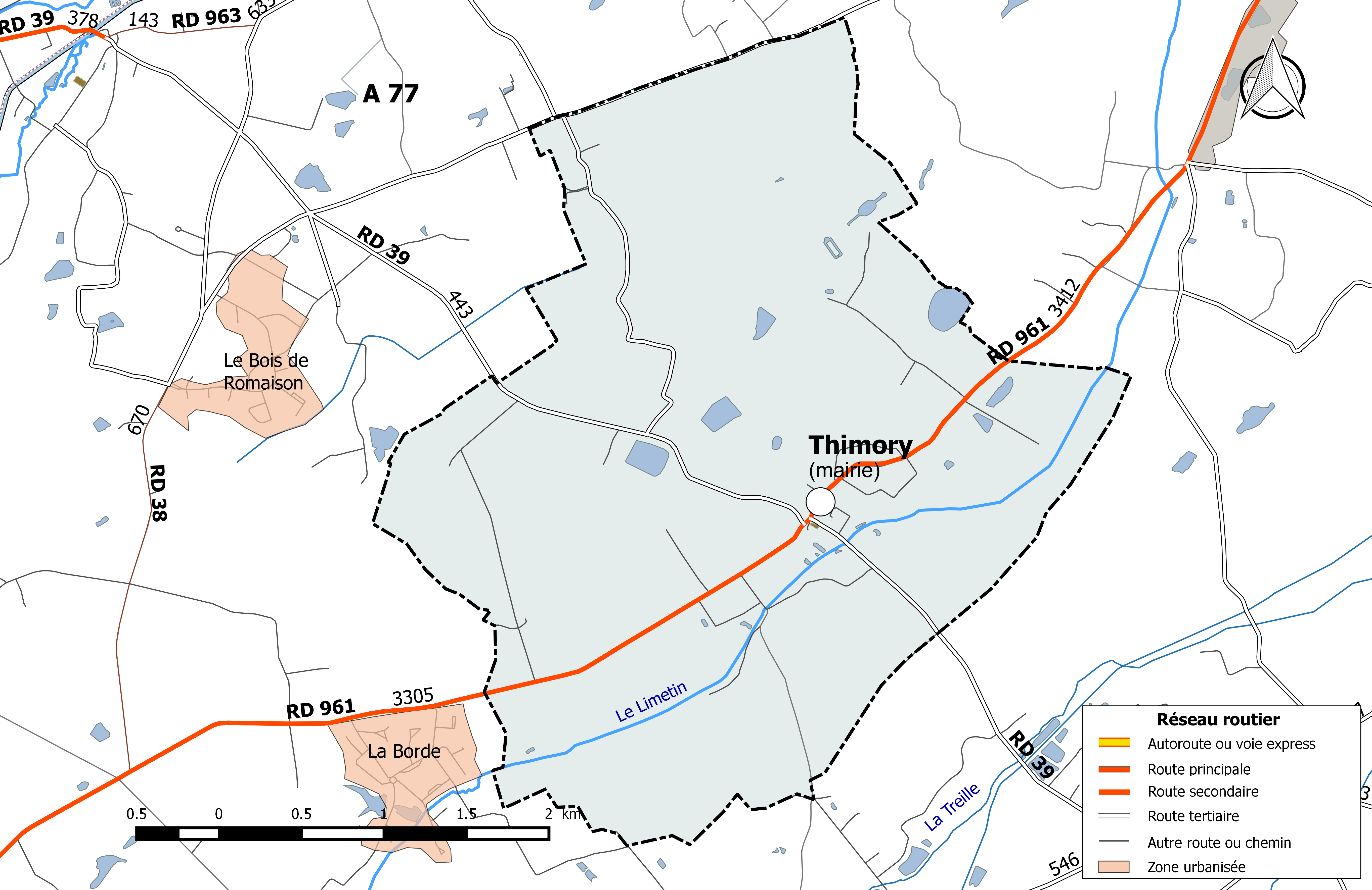 Carte du réseau routier de la commune de Thimory.